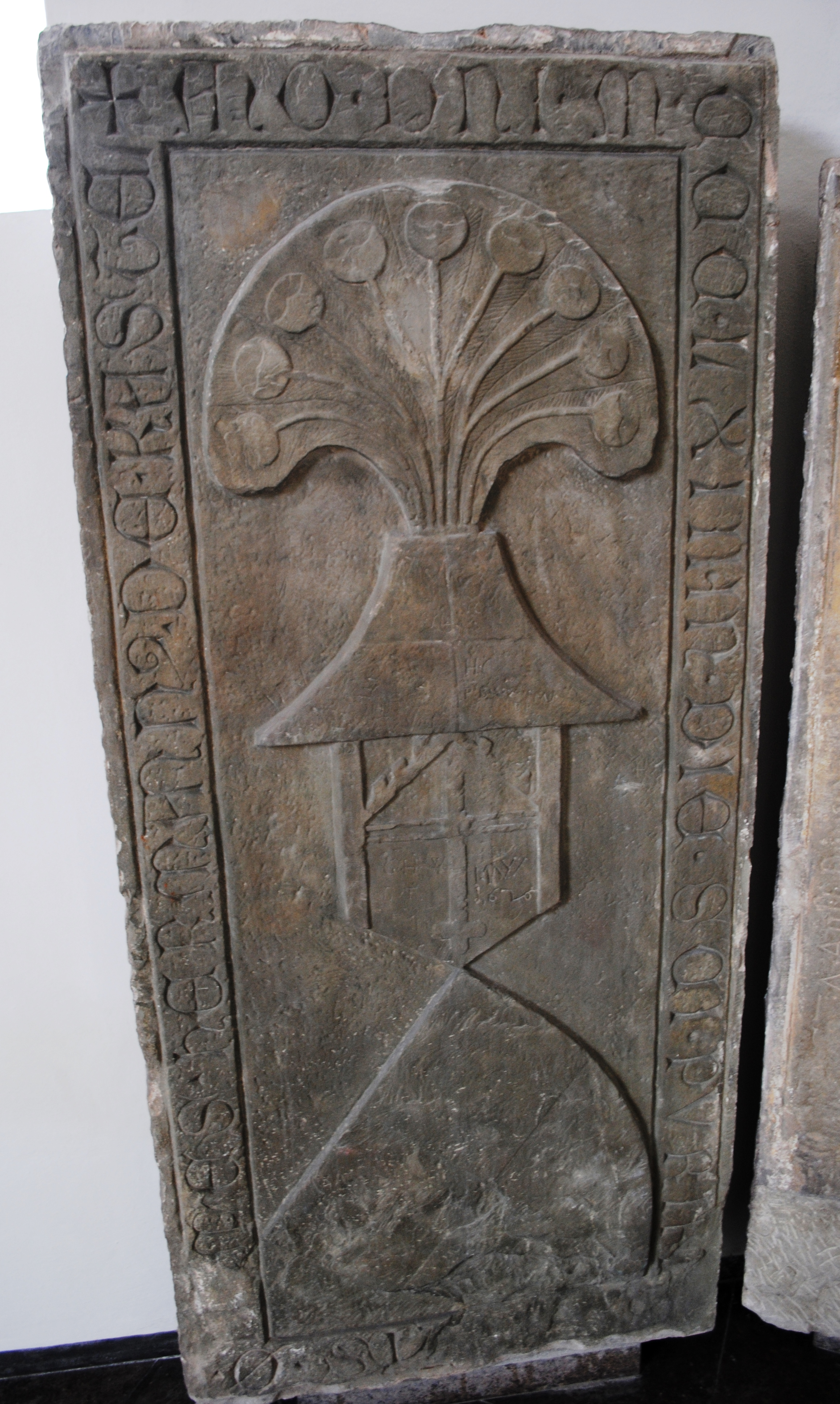 Kirche Rüdenhausen, Epitaph für Hermann IV. von Castell († 1363) This is a photograph of an architectural monument.